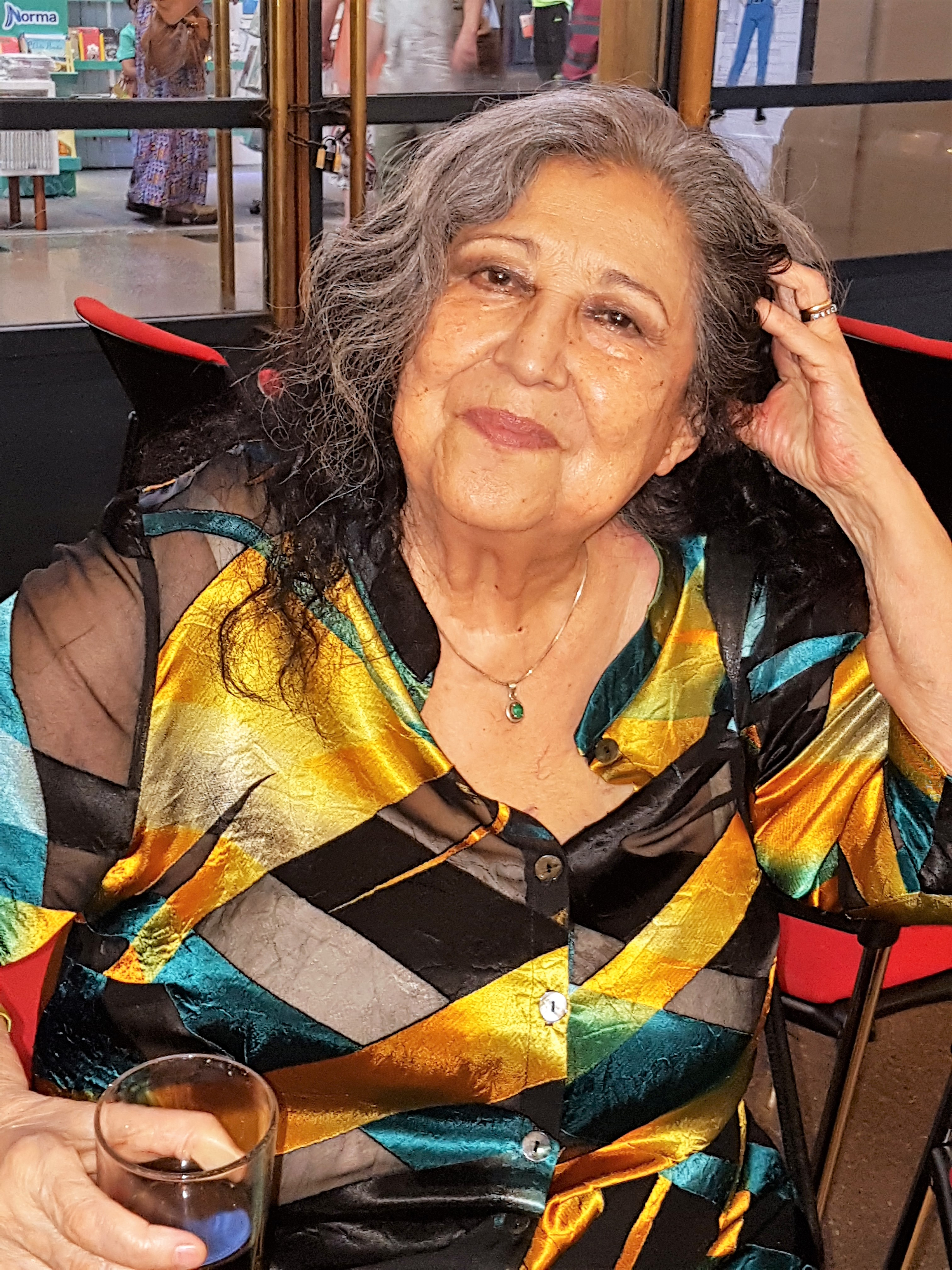 La poeta chilena Carmen Berenguer en la Feria Internacional del Libro de Santiago 2017